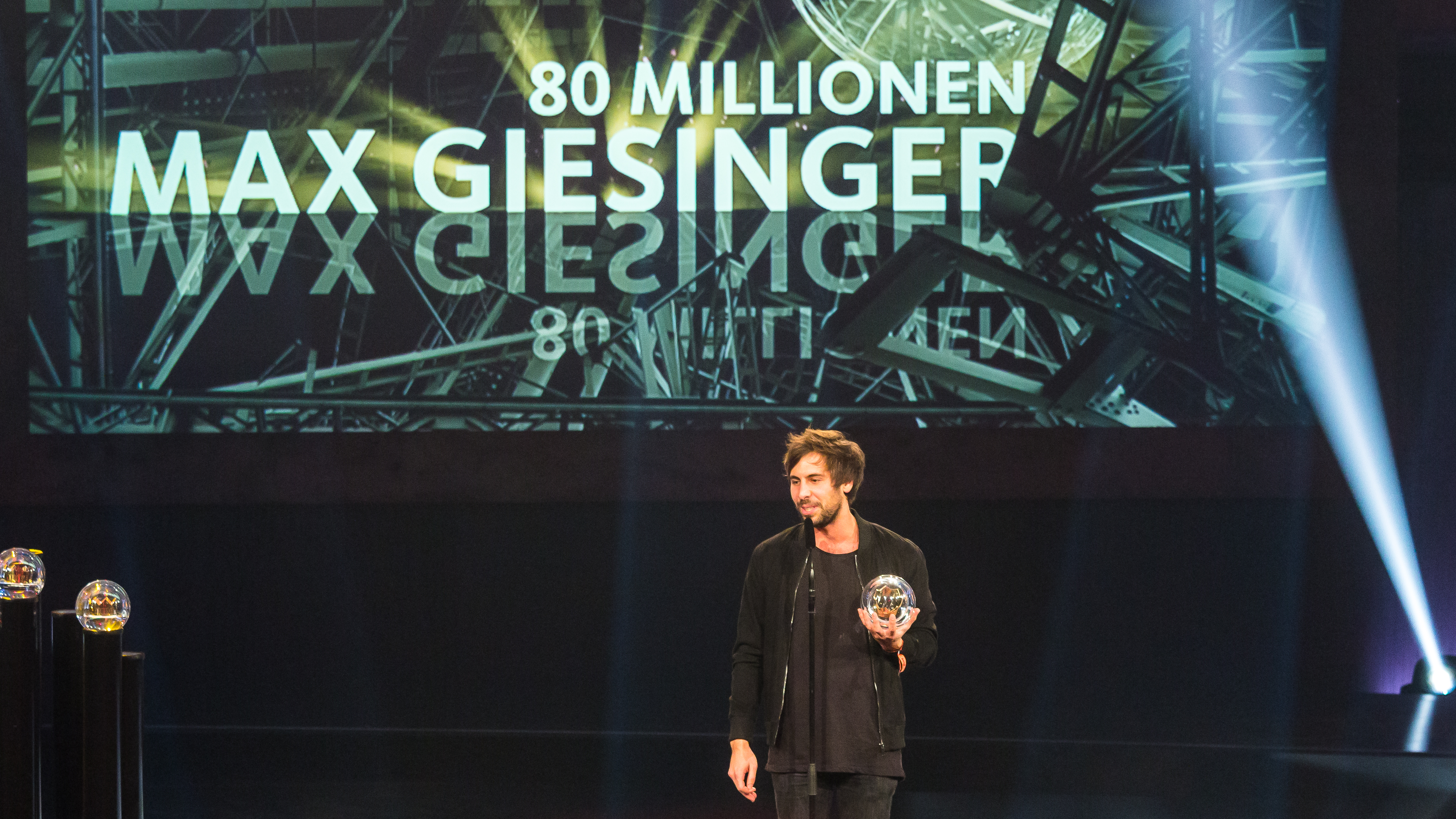 1LIVE Krone 2016 - 2015 - Show - Beste Single: Max Giesinger